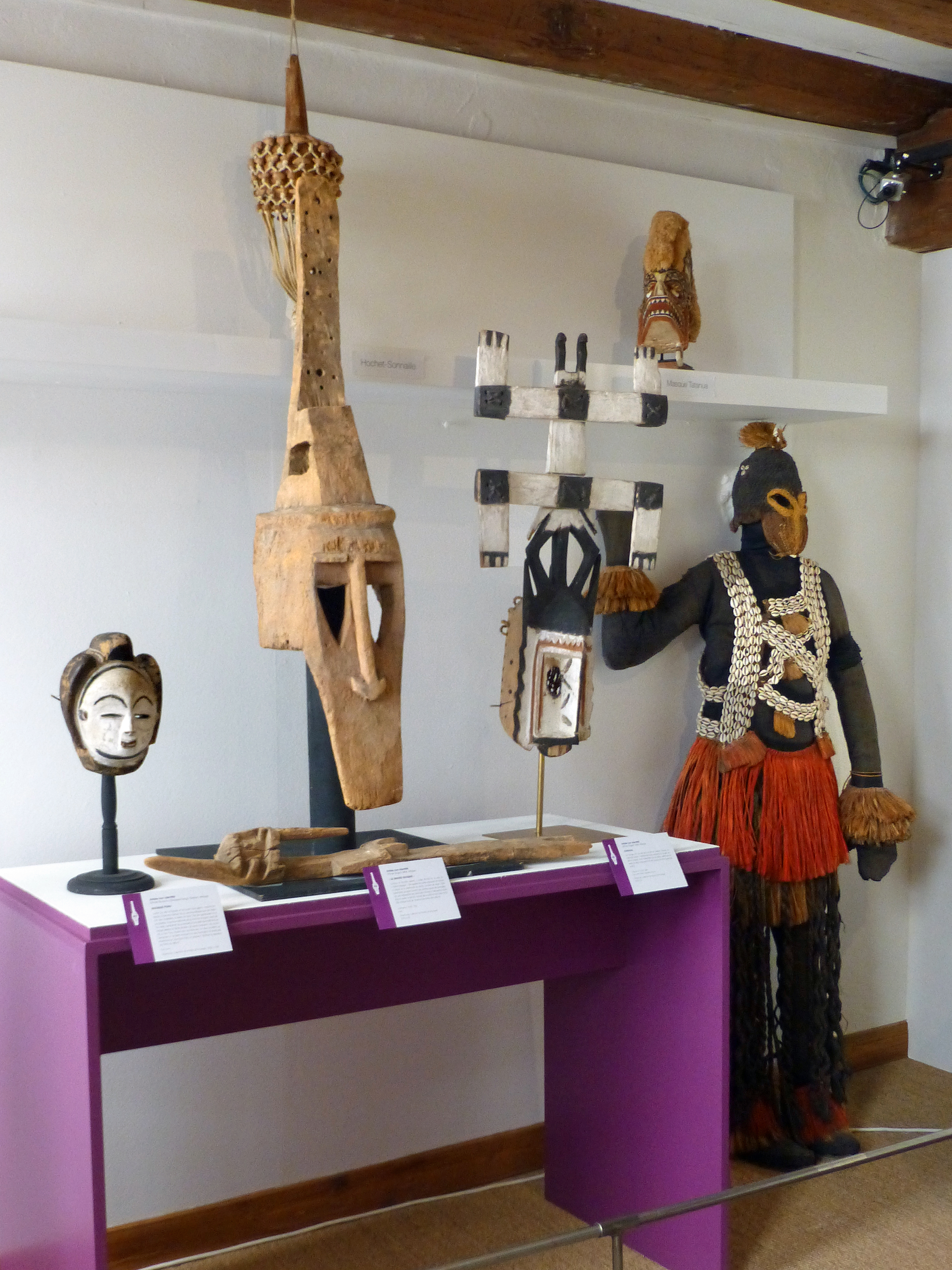 Passages. Rites initiatiques et funéraires : objets des collections de l'Institut d'ethnologie de l'université de Strasbourg, présentés dans le cadre d'une exposition temporaire (2015) au Musée alsacien, par les étudiants de Master2 de Muséologie.